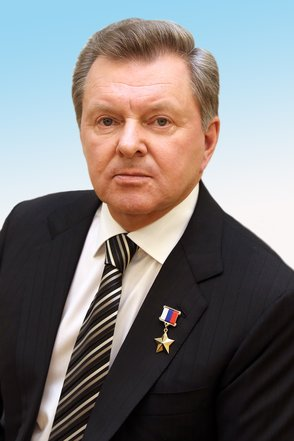 Белавенцев, Олег Евгеньевич